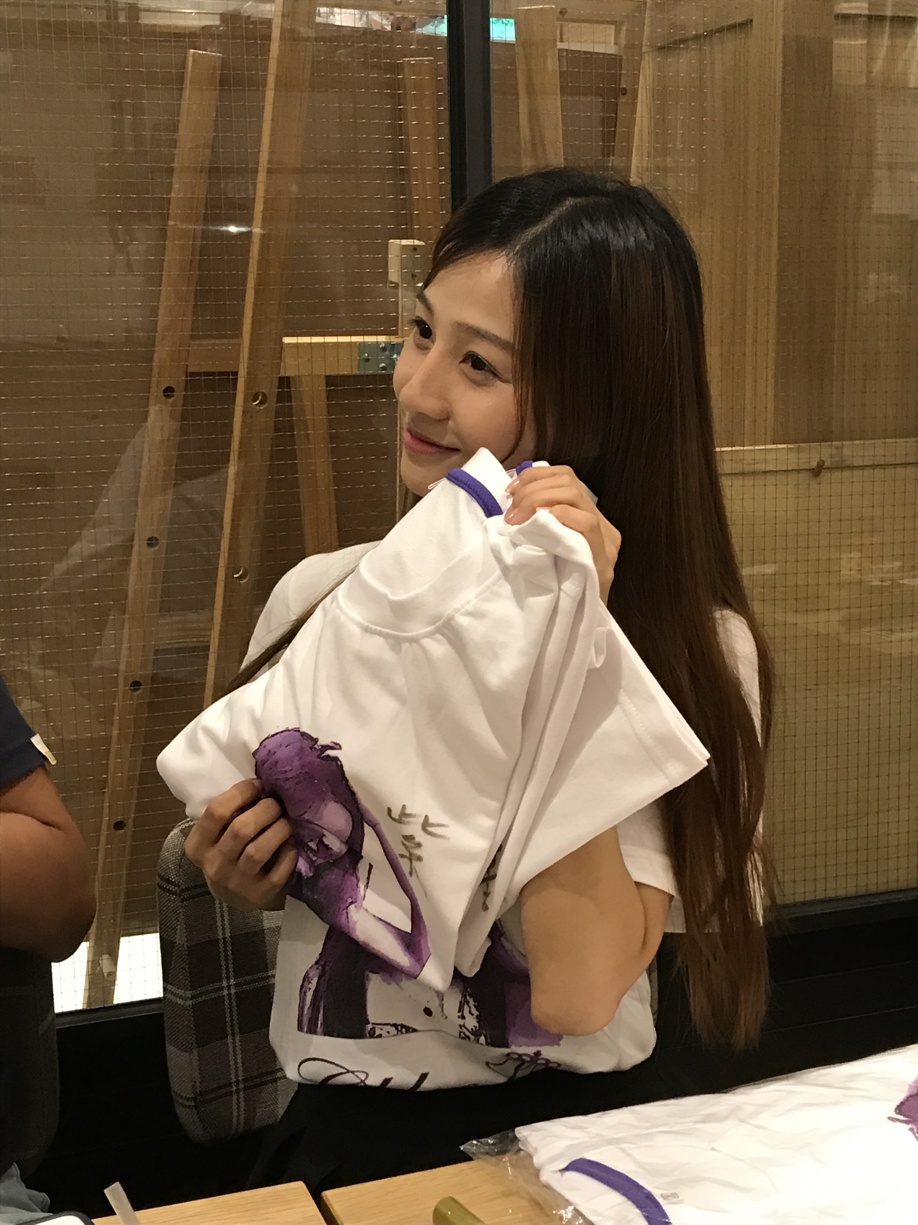 20170826FANS01